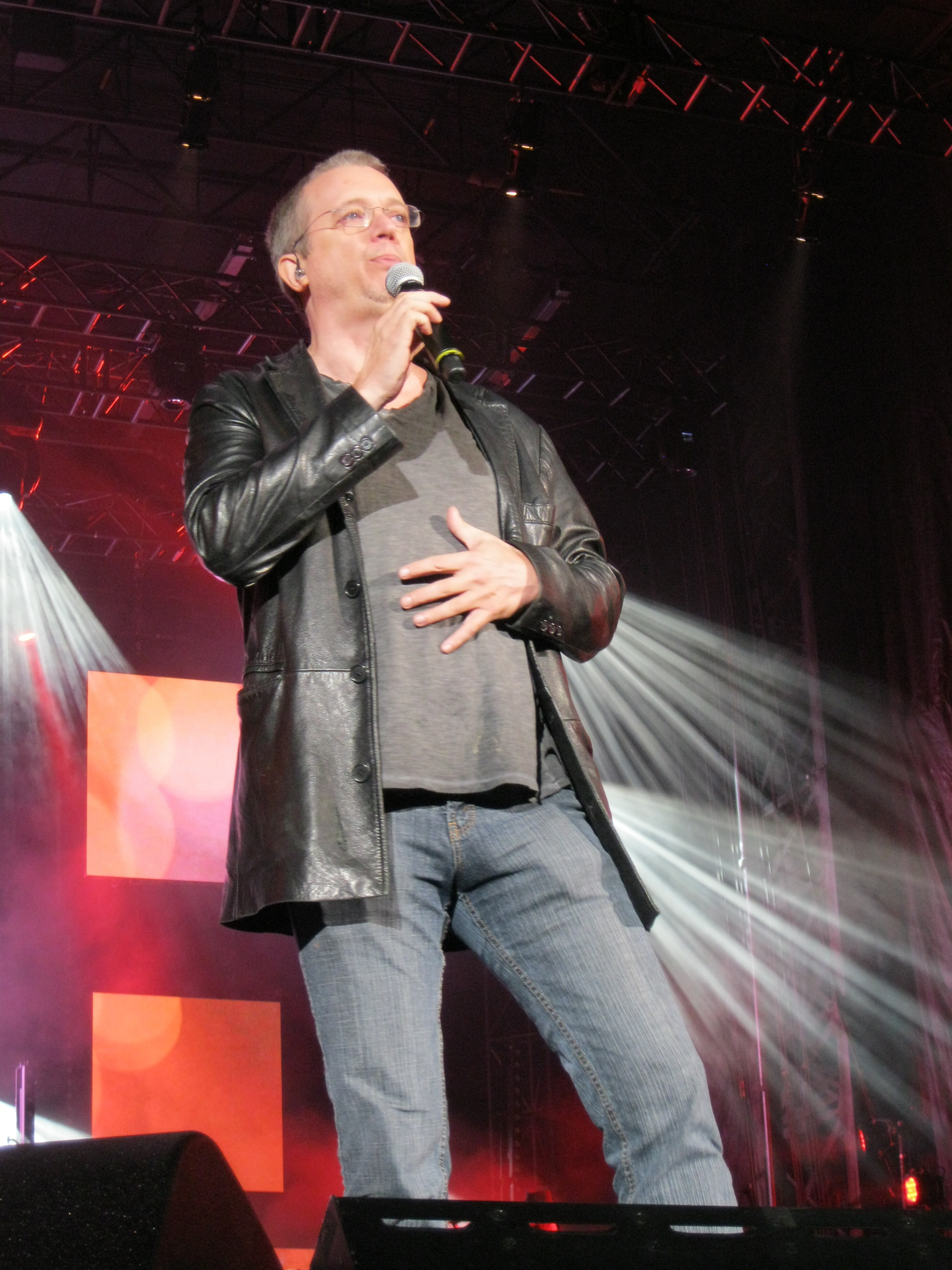 Pour célébrer les 25 ans des FrancoFolies de Montréal, le président, Alain Simard, a eu l'idée de réunir 25 artistes (ou groupes) qui chanteraient chacun LA chanson de leur répertoire la plus connue du public. Le spectacle a eu lieu lundi le 17 juin 2013 à partir de 21:00 à la place des Festivals. Dans l'ordre, sont apparus : Karim Ouellet, Ariane Moffatt, Richard Séguin, Corneille, Lisa LeBlanc, Daniel Lavoie, Mara Tremblay, Mes Aïeux, Luc De Larochelière, Dumas, Isabelle Boulay, Yann Perreau, Laurence Jalbert, Stefie Shock, Michel Rivard, Pierre Lapointe, Dan Bigras, Paul Piché, Vincent Vallières, Les Respectables, Damien Robitaille, Loco Locass, Daniel Boucher, Marjo et Éric Lapointe.